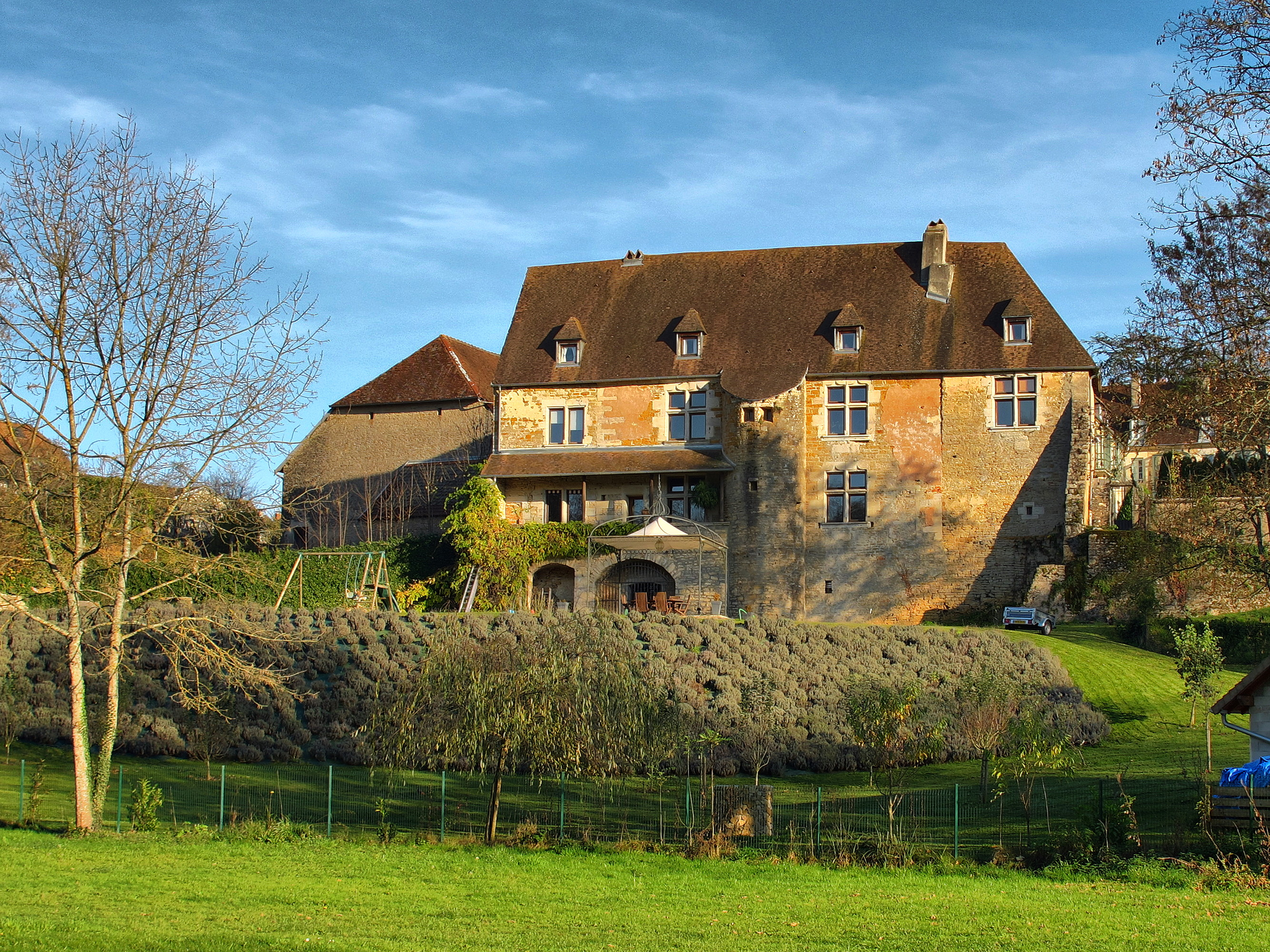 Inscrit aux monuments historiques sous le numéro : PA00101640